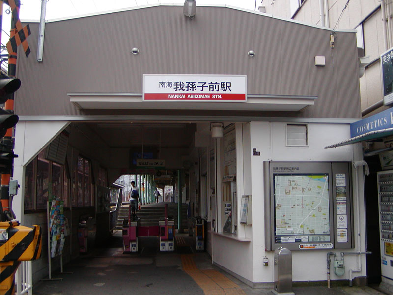 南海高野線 我孫子前駅 なんば方面行のりば（大阪市住吉区）